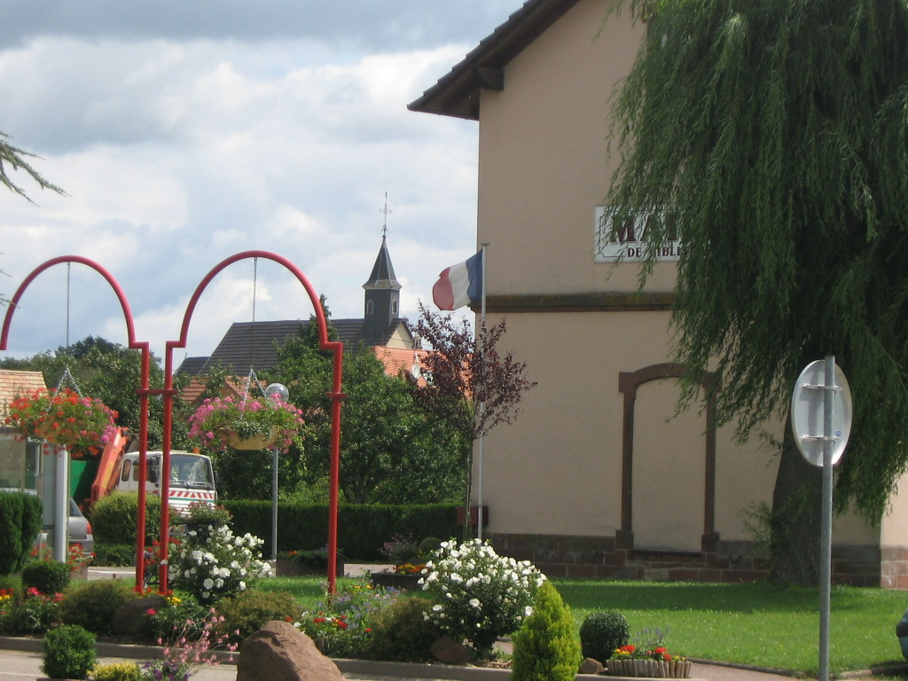 Vue de la mairie et de l'église de Biblisheim (67)